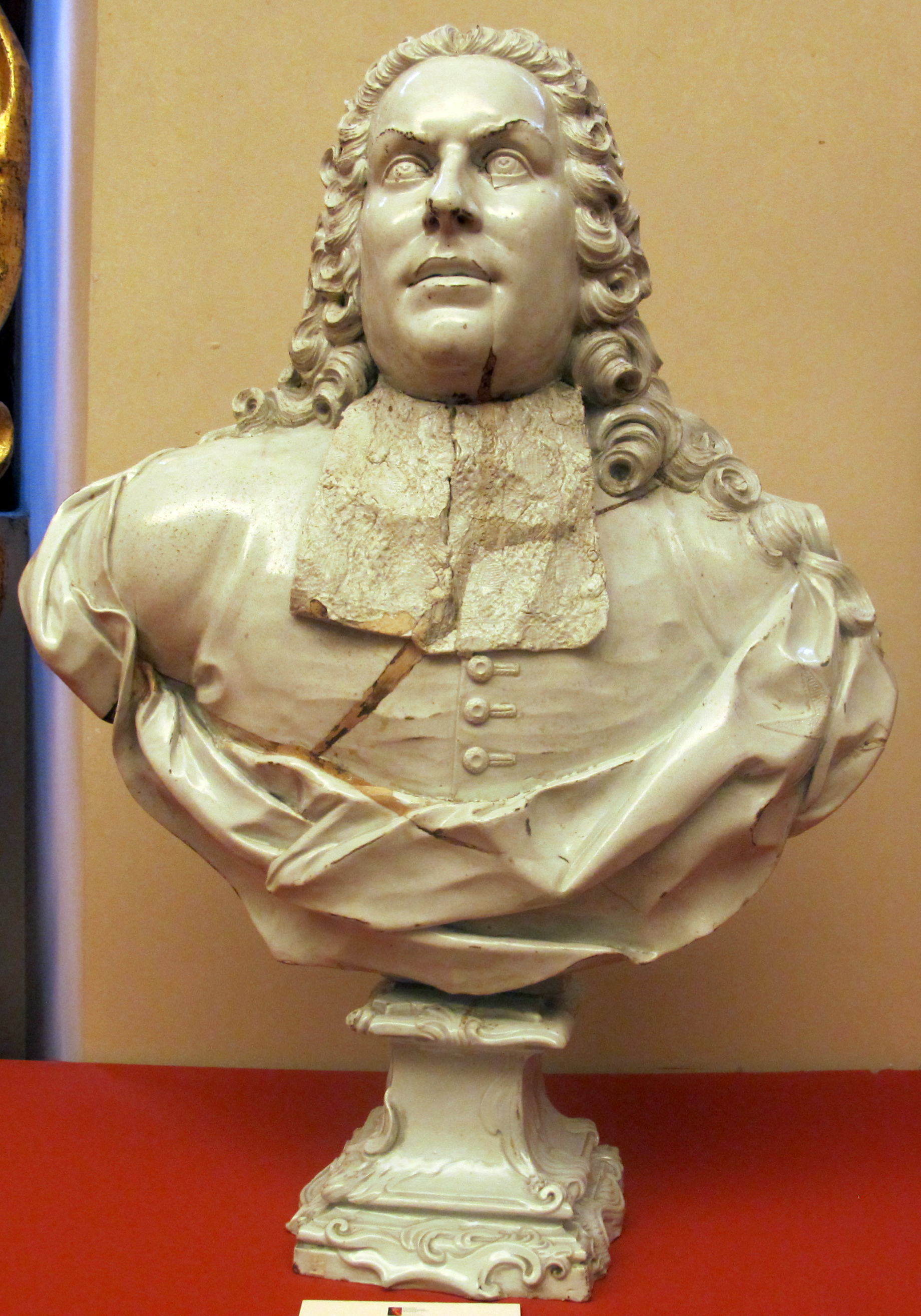 Mostra Ritorni, 2013